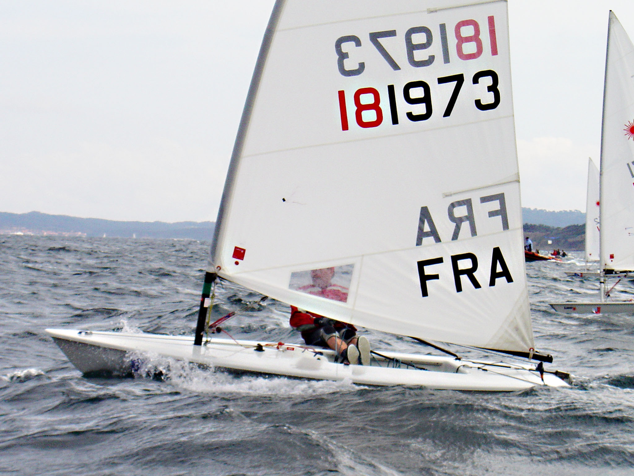 Photo prise la veille du début de la Semaine Olympique de Hyères 2005, dans la baie d'Hyères.